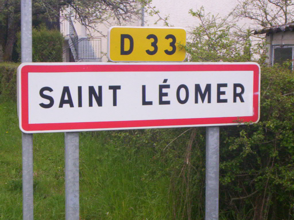 Panneau de ville de Saint-Léomer dans la Vienne (86)